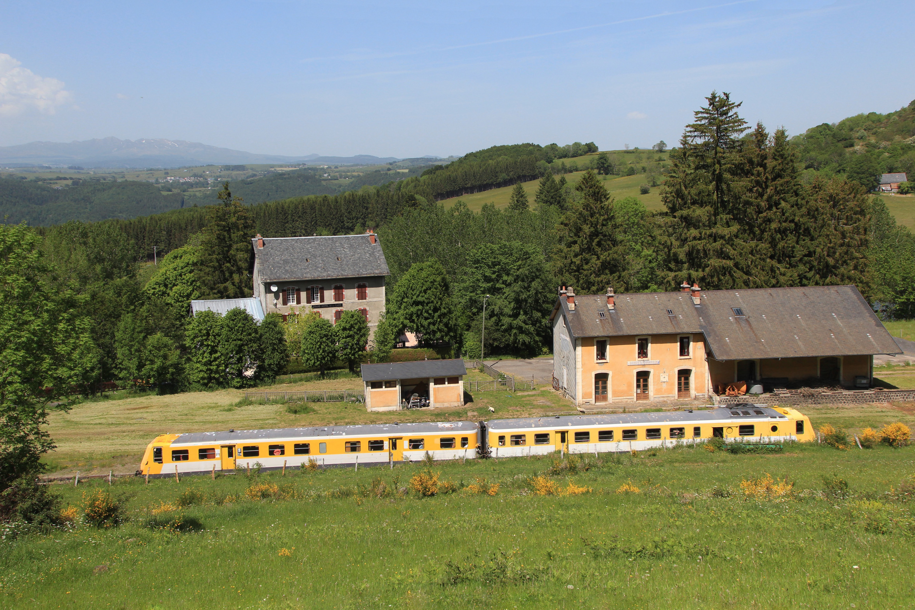 La rame RGP1 n° X 2725 passe devant l'ancien bâtiment voyageurs de la gare de Condat - Saint-Amandin.